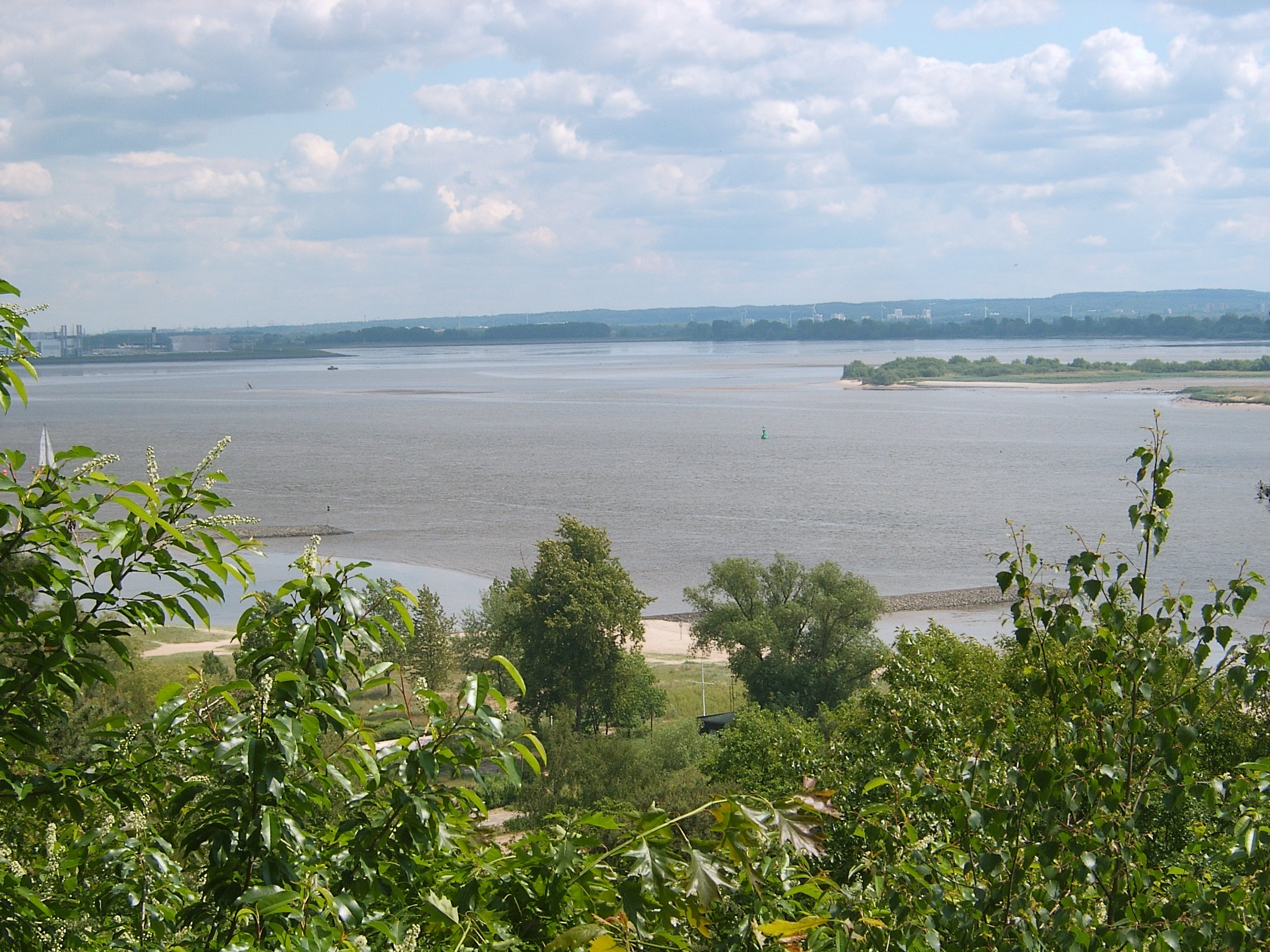 Hamburg-Finkenwerder, Elbe, Mühlenberger Loch. Blick in südöstlicher Richtung. Rechts in der Flußmitte die Elbinsel Neßsand, der zentrale Ort des Naturschutzgebietes. Links im Bild der als Halbinsel aufgeschüttete Mühlenberger Sand, Werksgelände von EADS. Wenn man genauer hinsieht, dann erkennt man dass die meisten Gebiete trockengefallen sind, also Niedrigwasser (Ebbe) ist. Aus diesem Blickwinkel hinter Neßsand existiert eine Fahrrinne für die Fähre nach Cranz. Der hier sichtbare Bereich ist Hamburger Staatsgebiet.